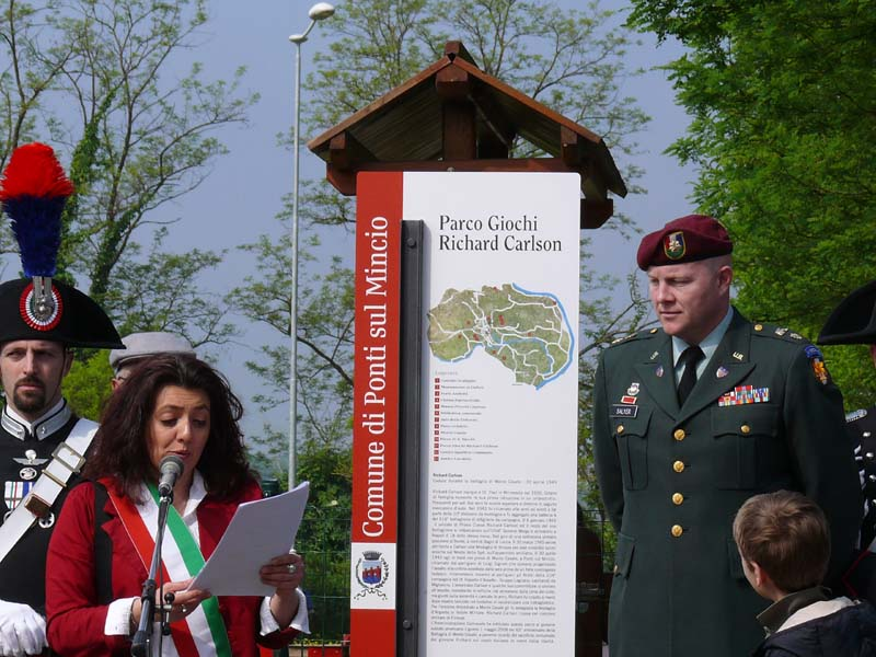 Commemorazione ufficiale della Battaglia di Monte Casale (30.04.45) e inaugurazione del parco giochi dedicato al soldato americano Richard Carlson morto asieme ad alcuni partigiani e agli arditi nel combattimento. -1 maggio 2008